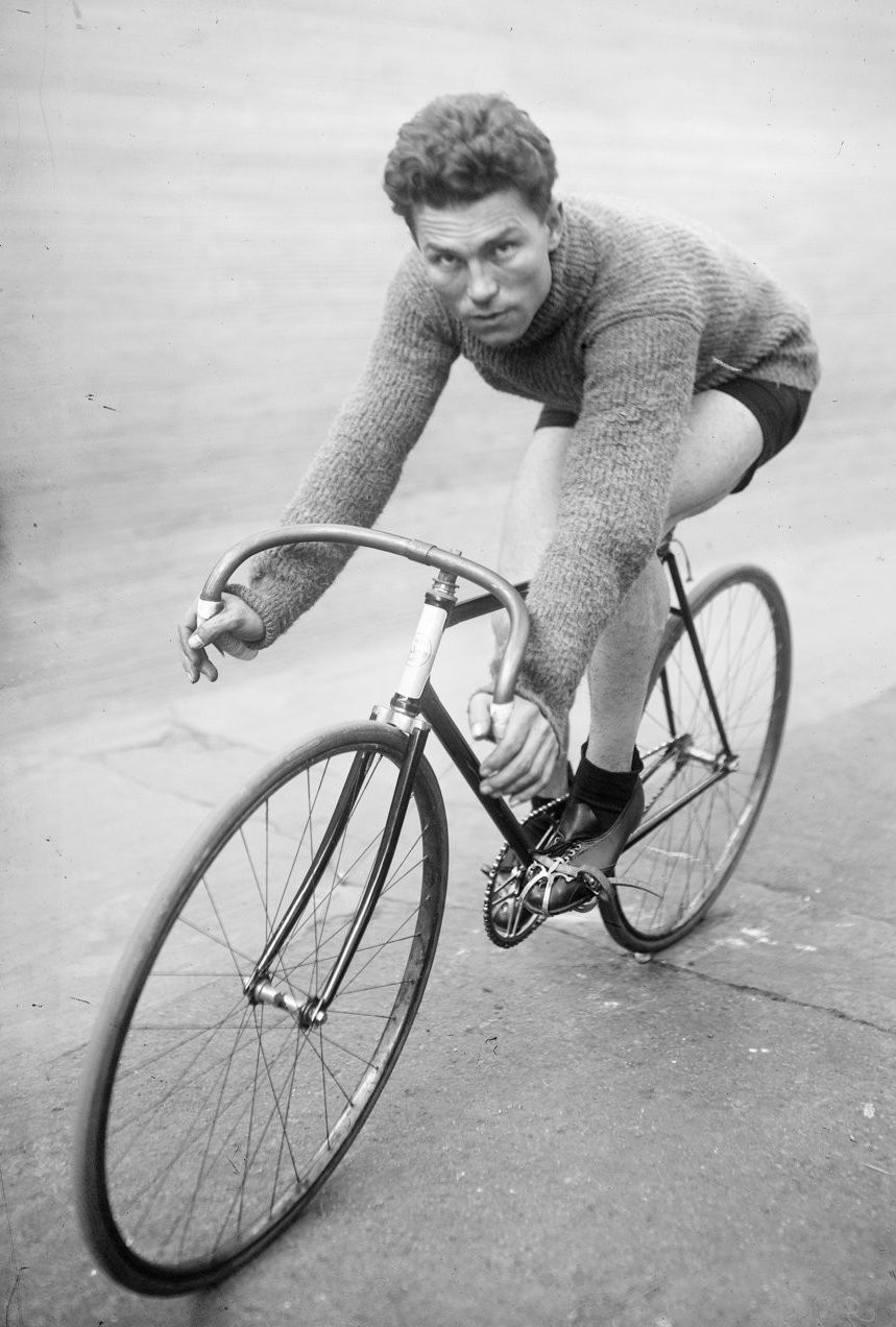 Émile Aerts, coureur cycliste belge